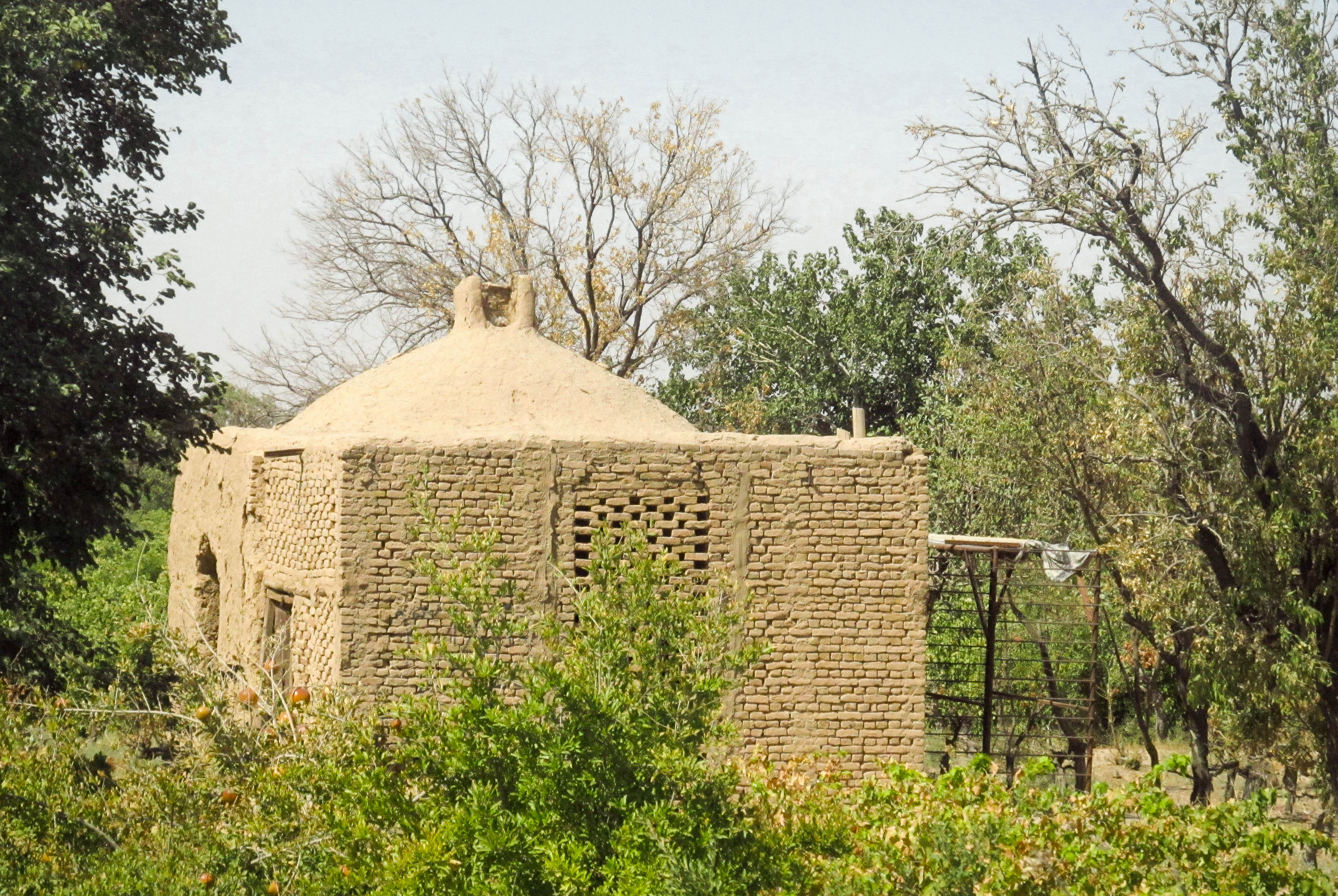 عکس از کوچه باغ های روستای مغان گرفته شده است